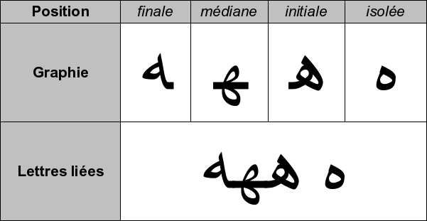 Variantes contextuelles de hāʾ